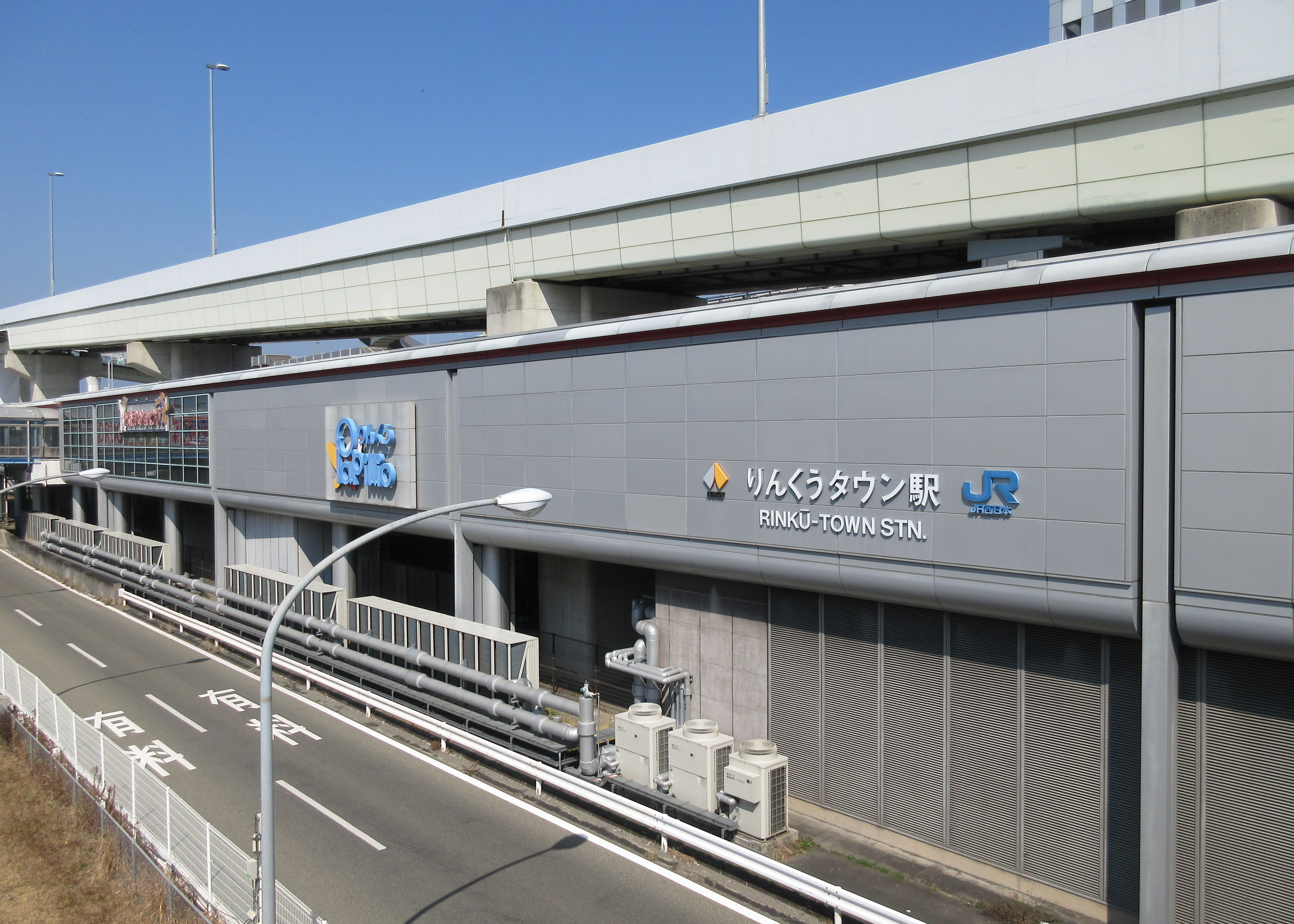 りんくうタウン駅